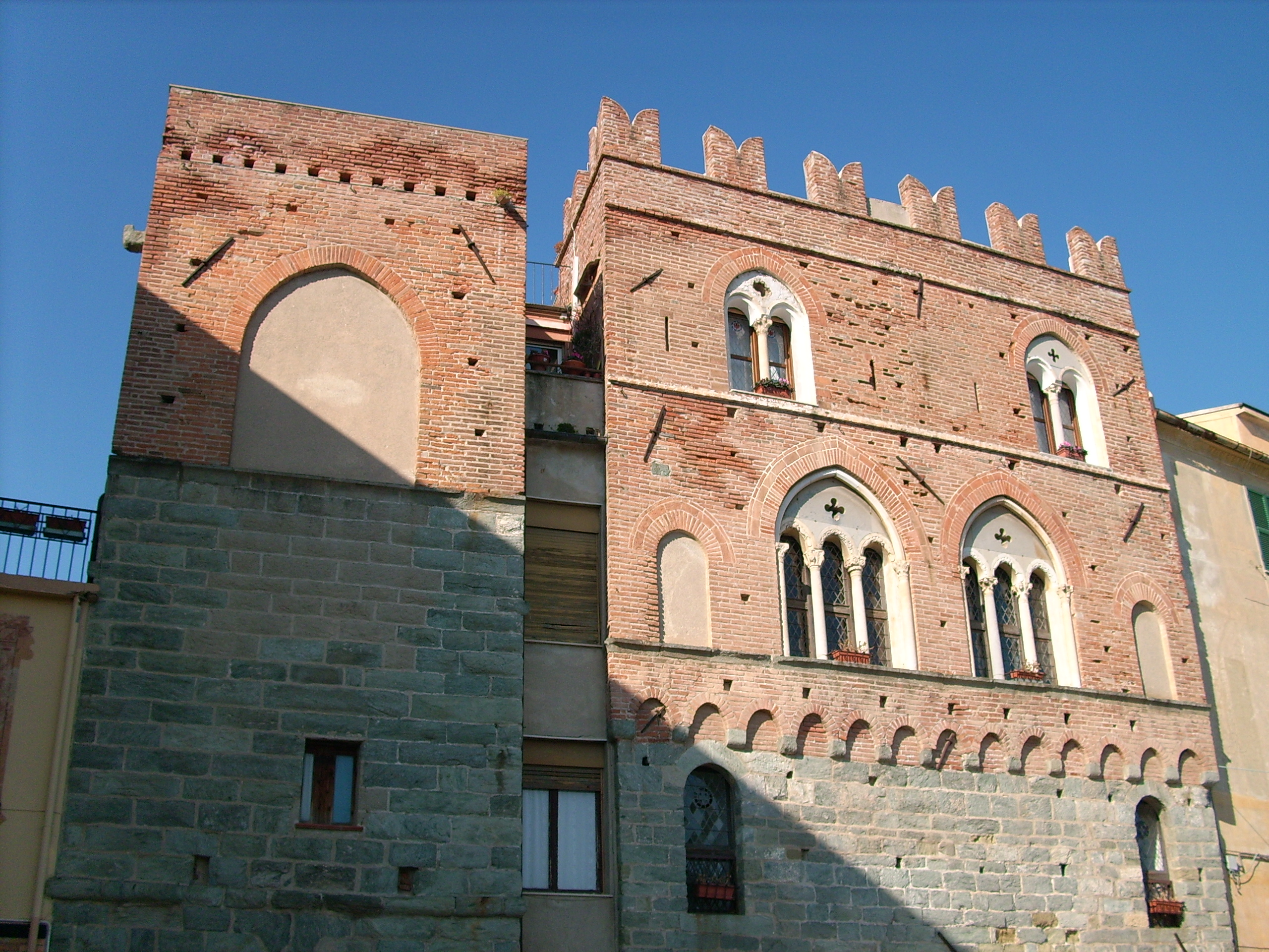 Palazzo di Noli, Liguria, Italy